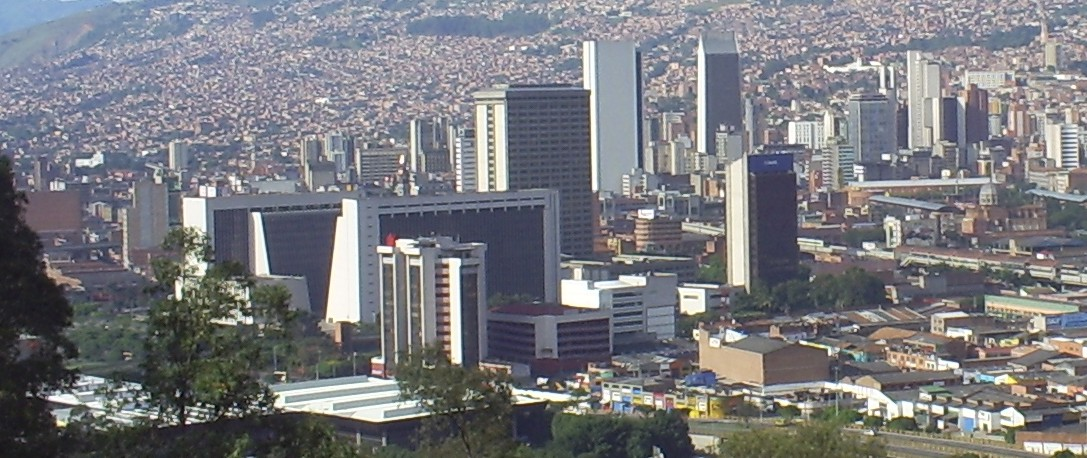 Vista del Centro de Medellín, Colombia.